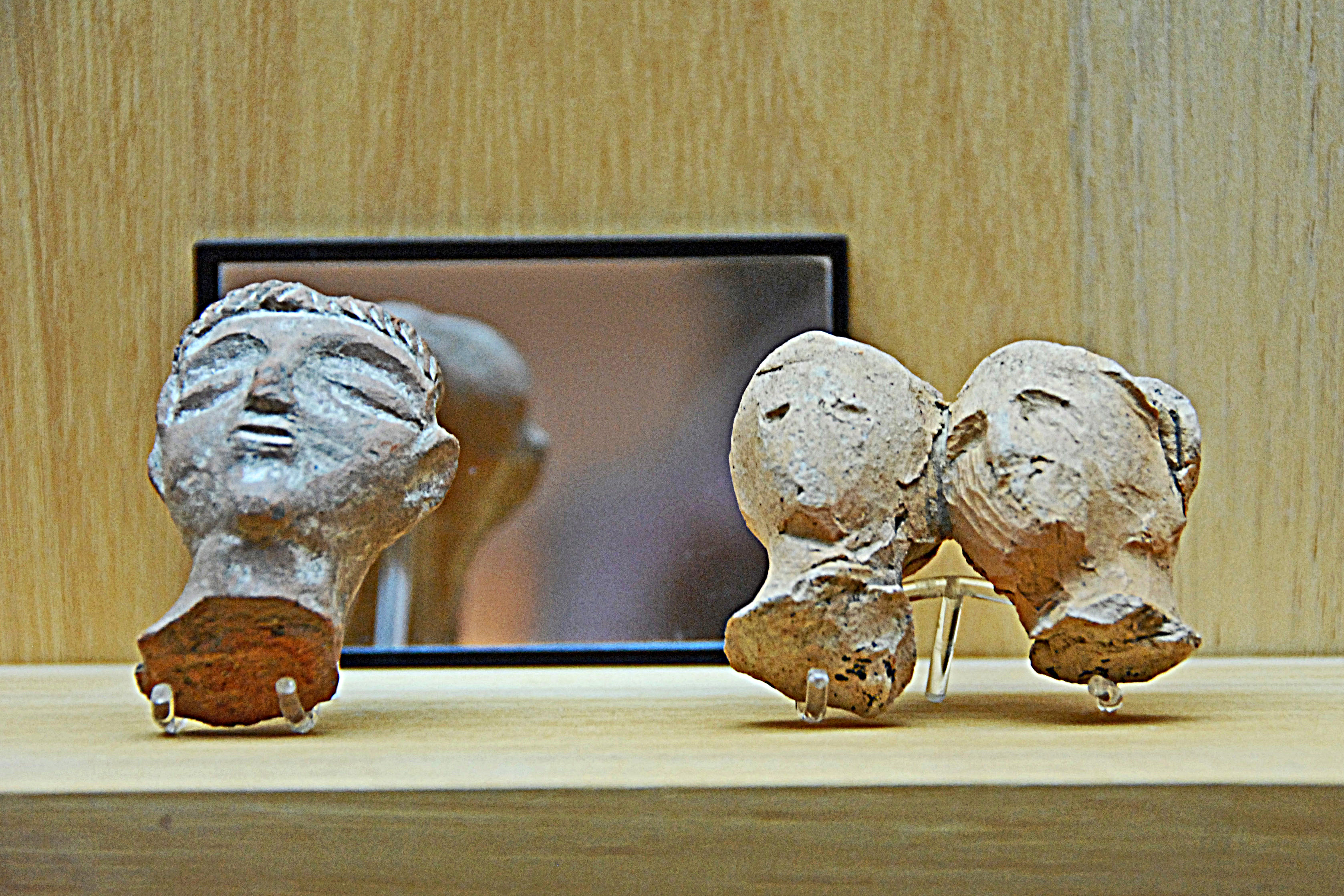 Civaux, Museum, gallorömische Keramikköpfe